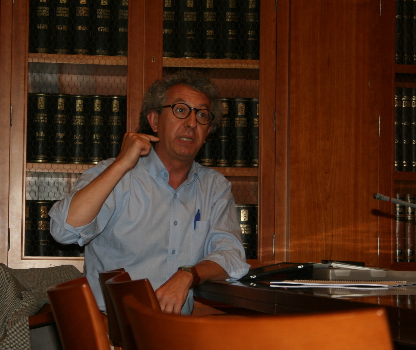 Antonio Calvo Roy. Jornada Epidemiología para Periodistas y Comunicadores. Madrid, 12 de junio de 2014.